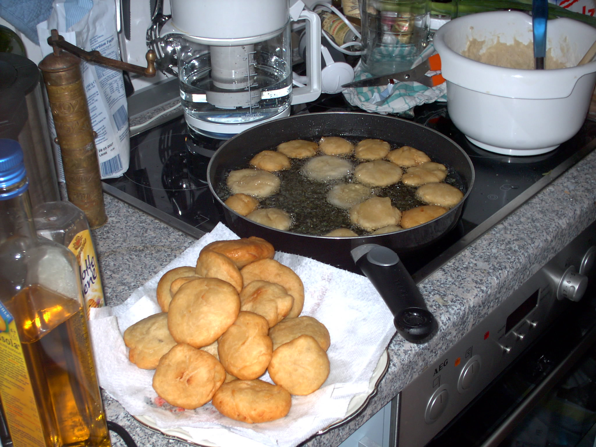 werden in der Pfanne frittiert